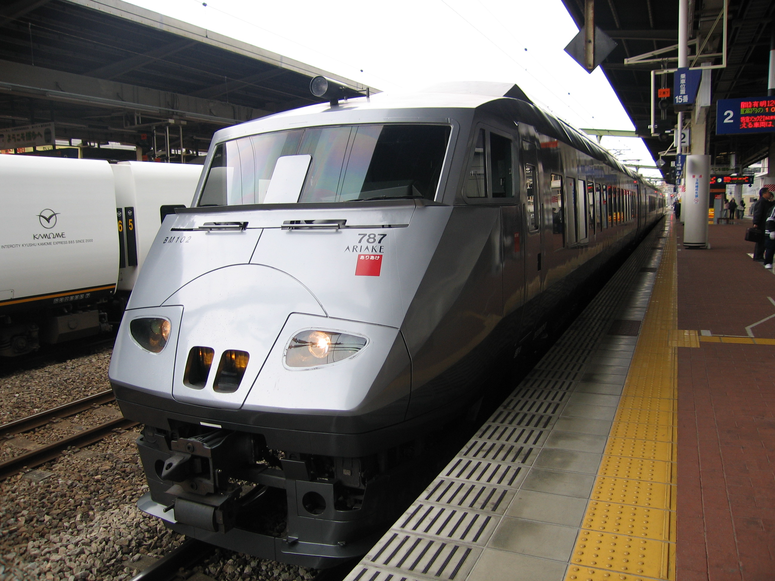 JR九州787系電車(「有明」として運用) JR Kyushu 787(Operated as Ariake)